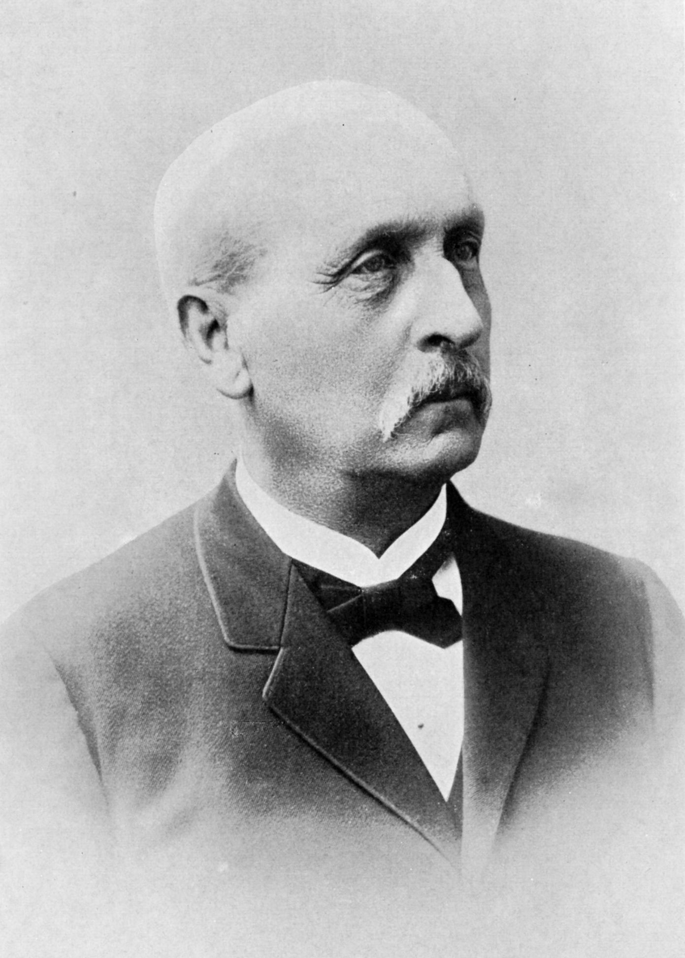 Georg Strömberg (1823-1906), finländsk generaldirektör